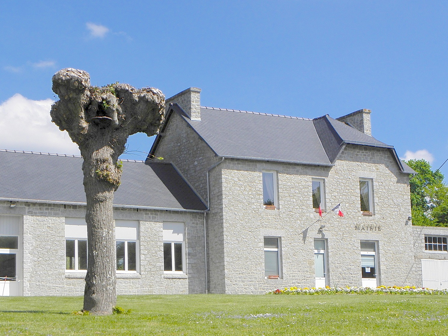 Mairie du Hinglé (22).